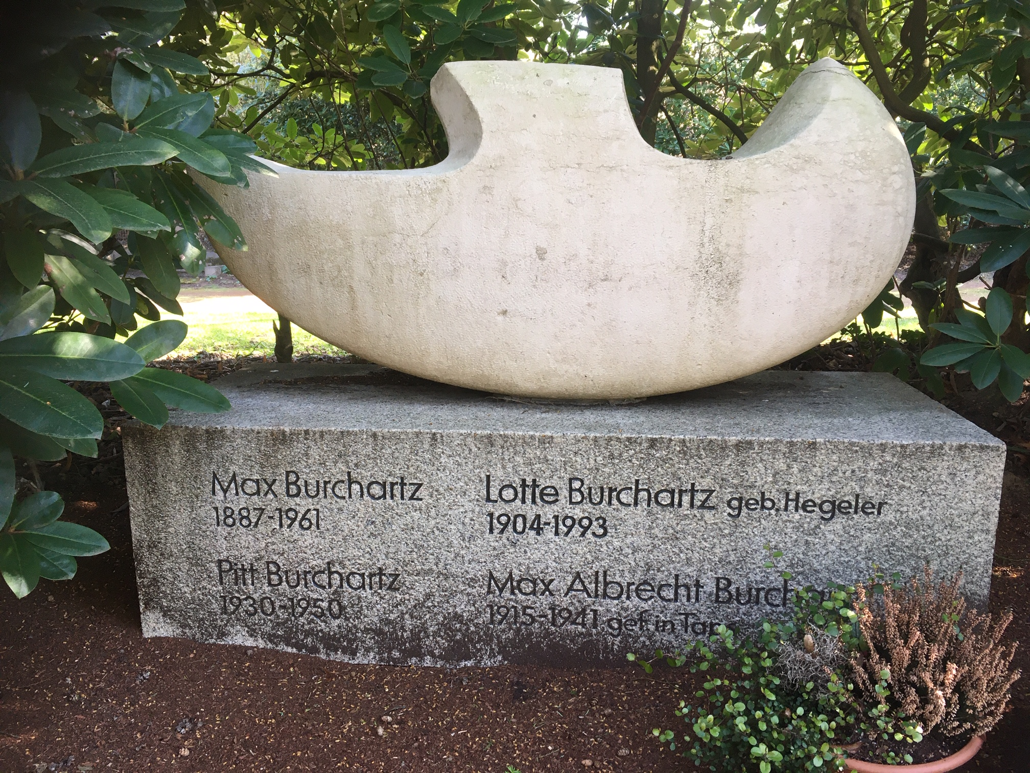 Grabstelle der Familie Burchartz, Essen, Südfriedhof, Lührmannstr; Feld 2 (Waldgräber), Nr. 4-4b